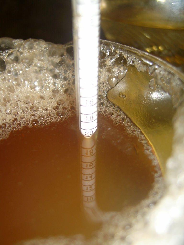 Merjenje sladkorne stopnje mošta s potopnim refraktometrom.